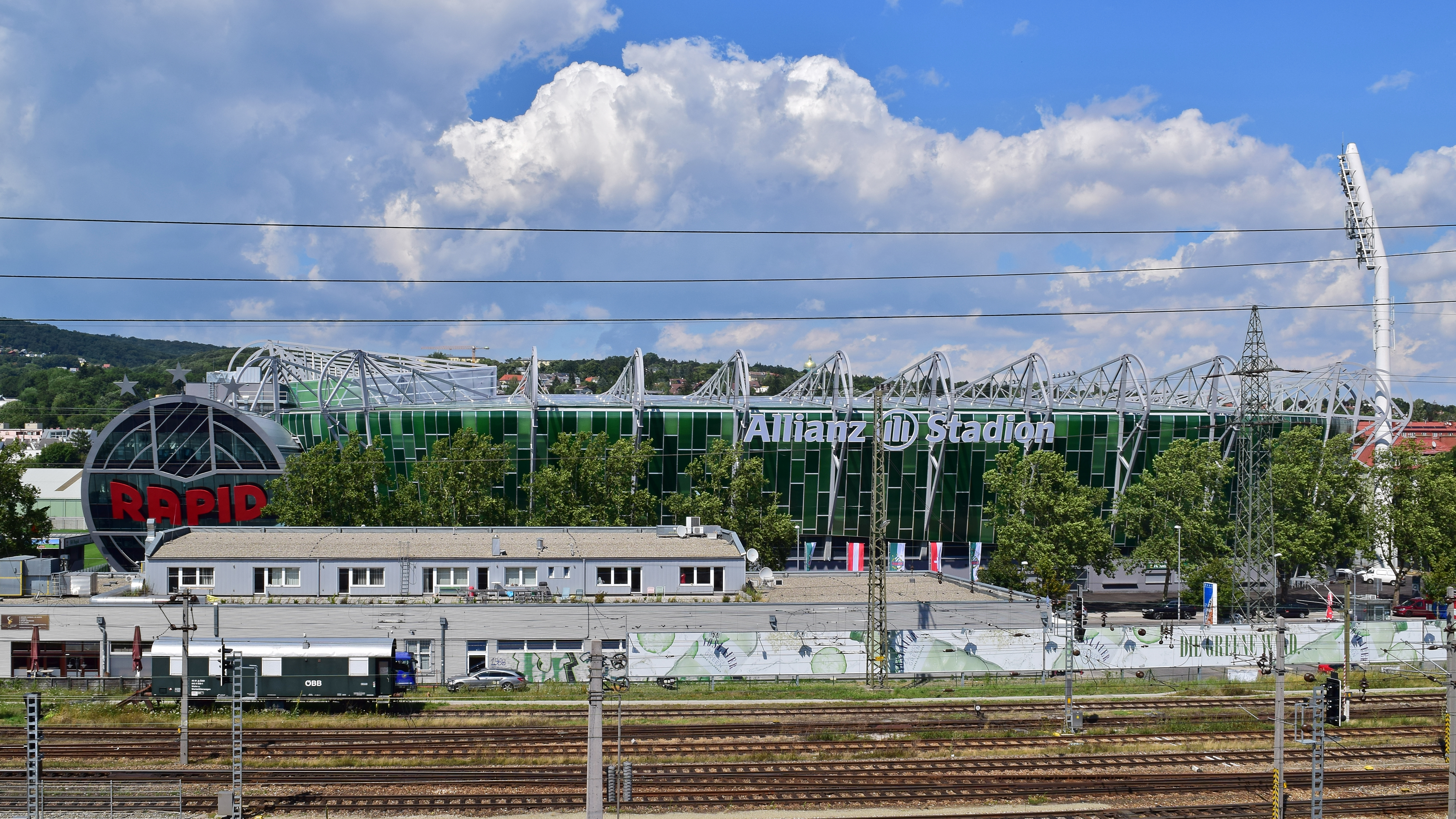 Blick vom Parkhaus U4-Hütteldorf auf das Allianz-Stadion